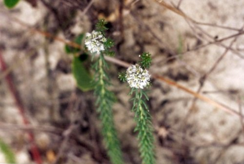 Polygala cyparissias - POLYGALACEAE Praia de Mo�ambique - Florian�polis - SC - Brasil